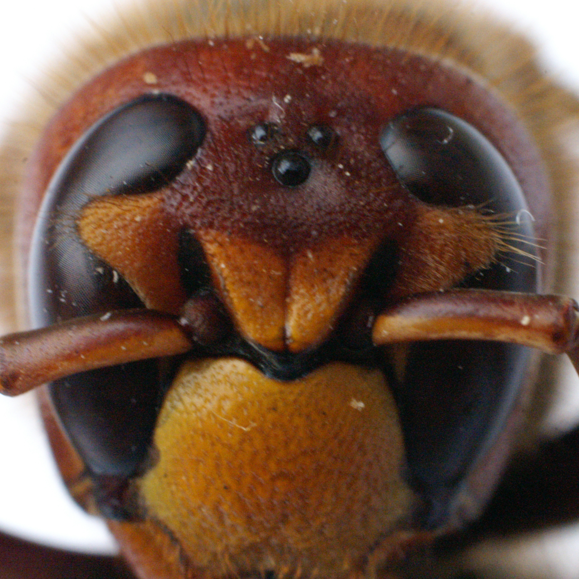 Beschreibung: tote Hornisse Kopfdetail